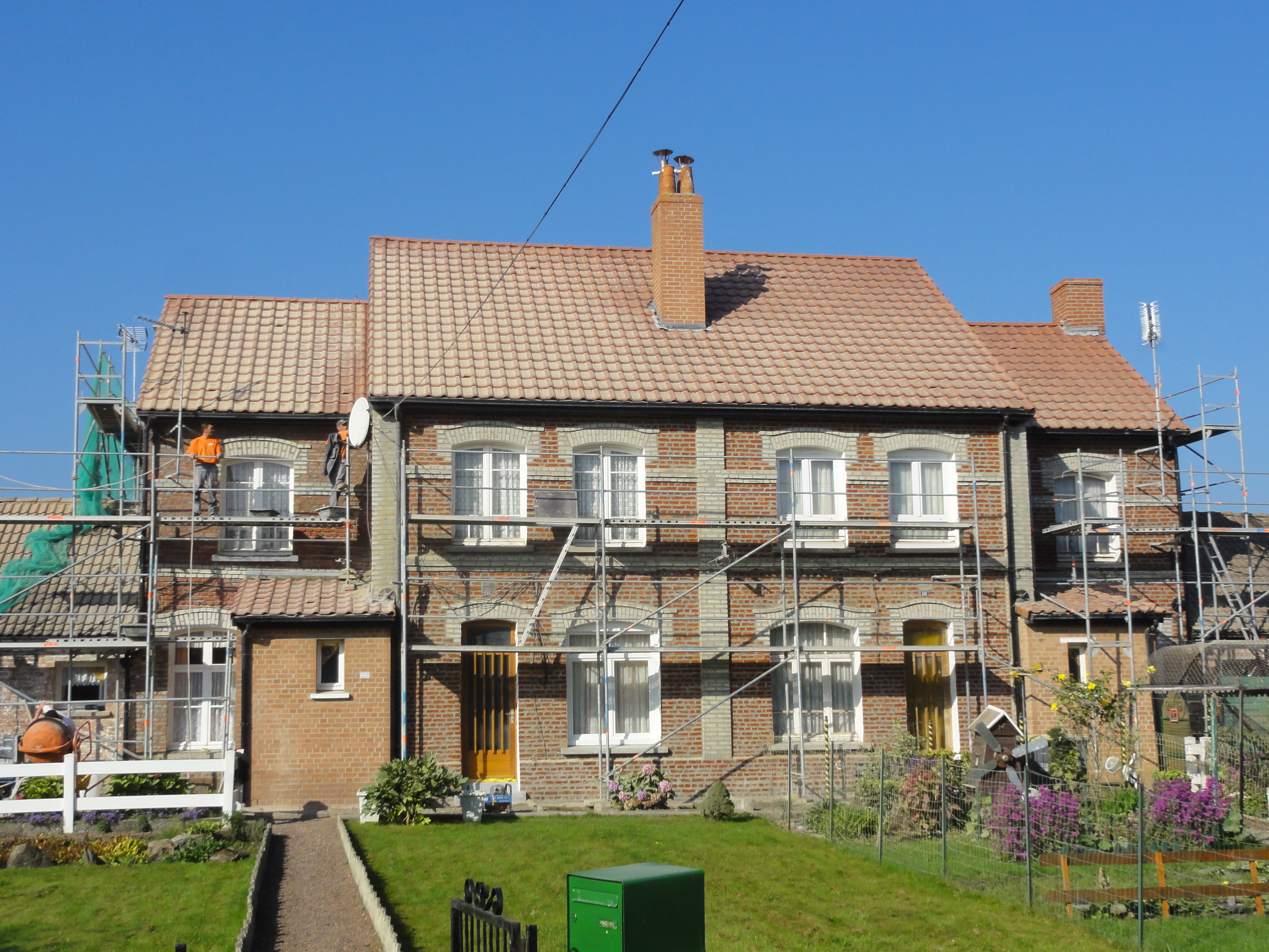 Cités de la Fosse n° 5 - 5 bis de la Compagnie des mines de Bruay, Bruay-la-Buissière et Divion, Pas-de-Calais, Nord-Pas-de-Calais, France.